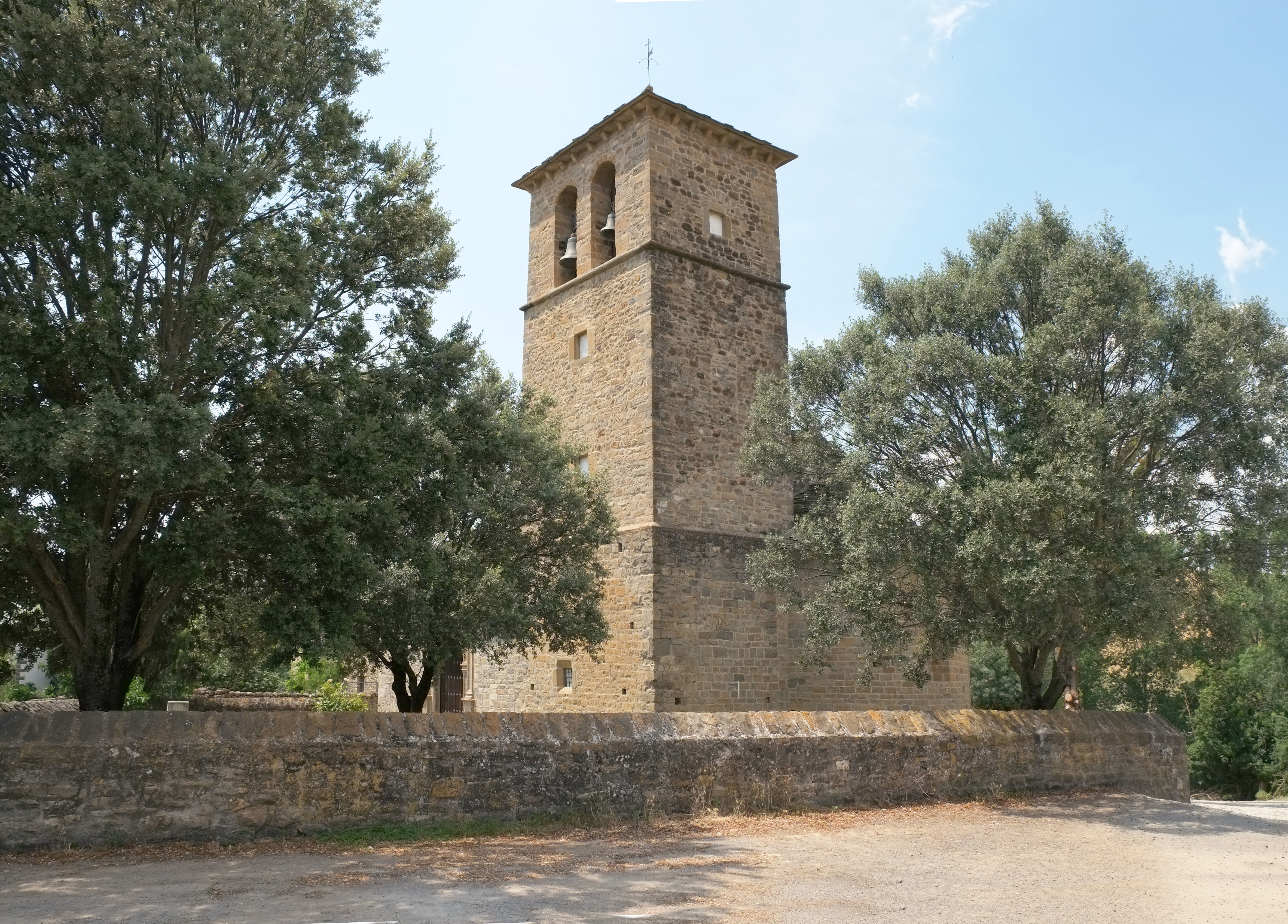 Kirche San Andrés in Abay in der Provinz Huesca in Aragonien (Spanien)